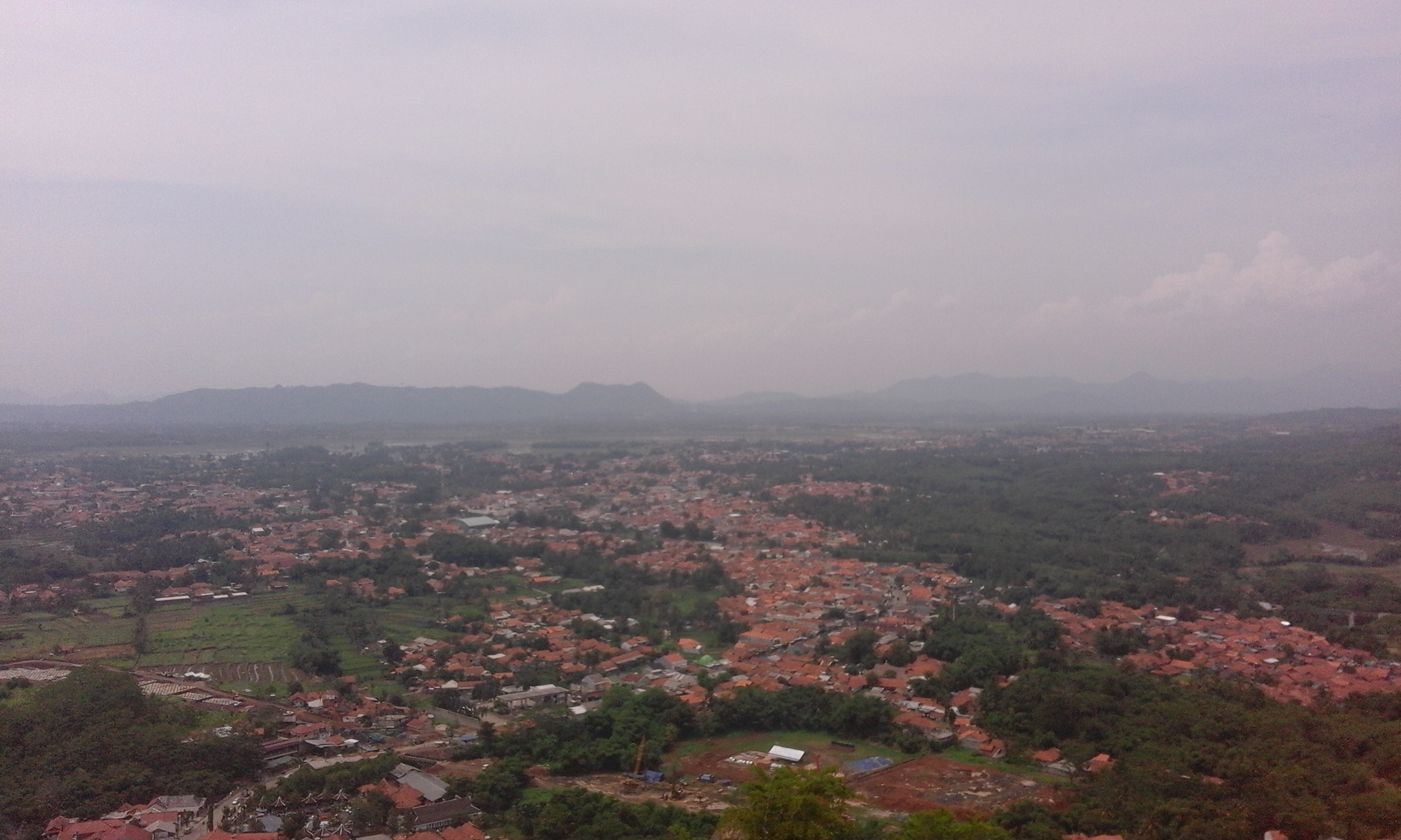 Photo panorama dari sudut pandang Desa Anjun Kabupaten Purwakarta dari atas Gunung Cupu